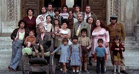 Screenschot d'une scène du film